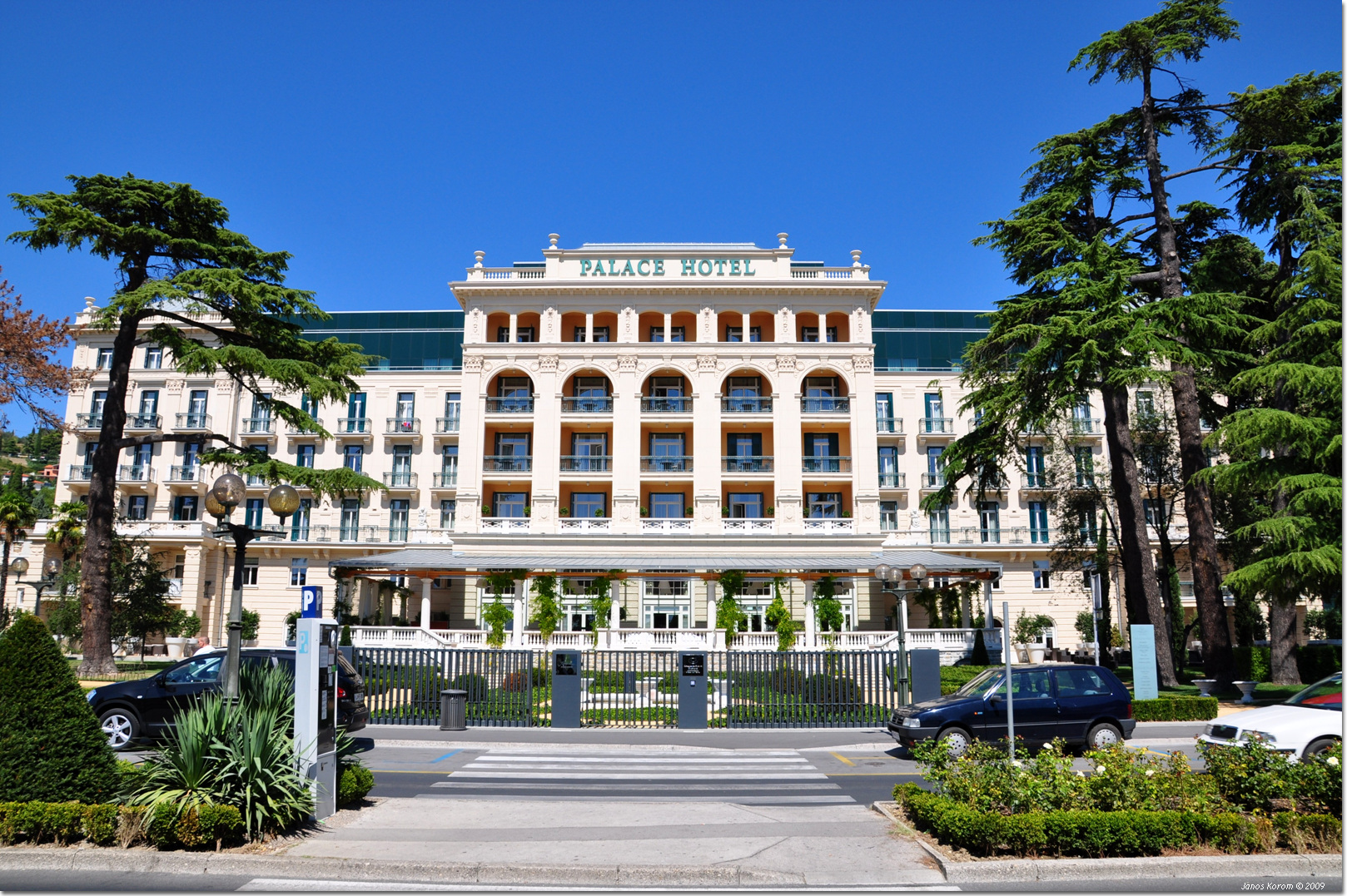 Portoroz (10)